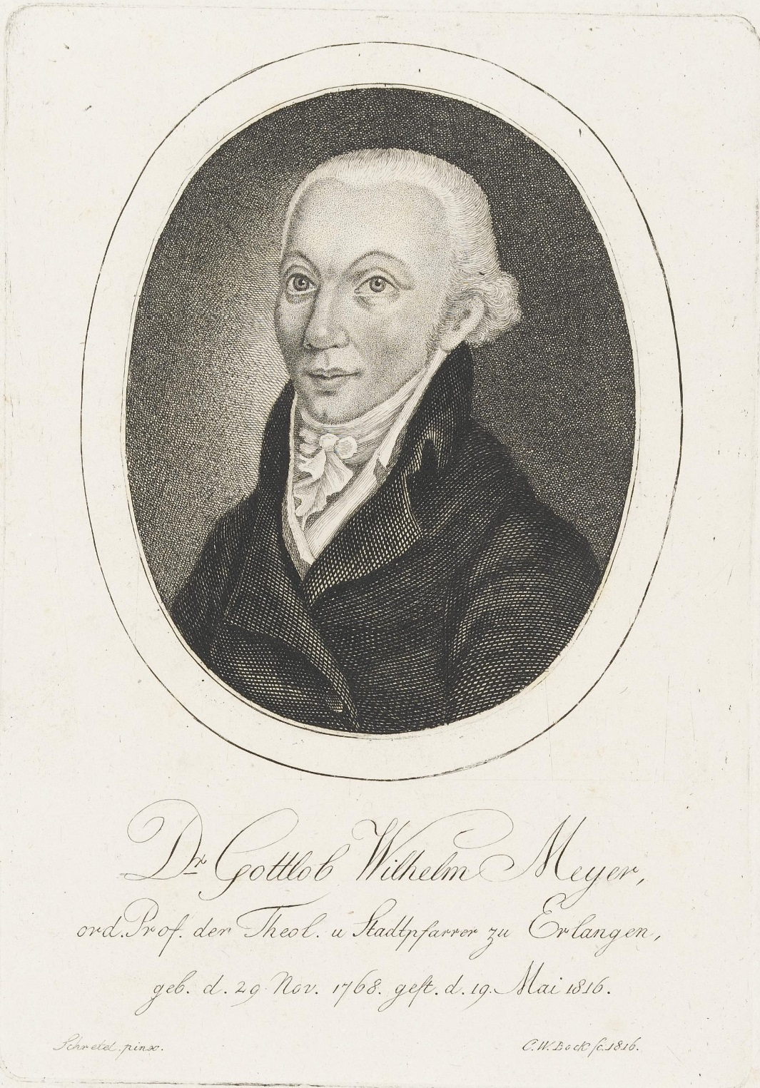 Bildnis des Gottlob Wilhelm Meyer, Universitätsprediger zu Göttingen und Altdorf, Prof. und Stadtpfarrer in Erlangen. Kupferstich und Radierung von Christoph Wilhelm Bock 1816